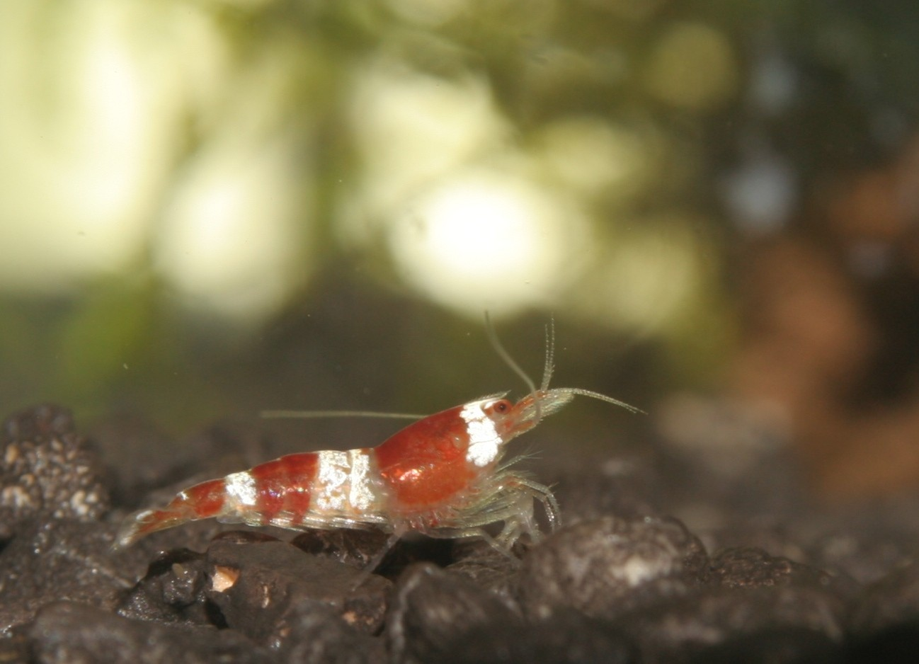 Jungtier der Crystal Red-Garnele